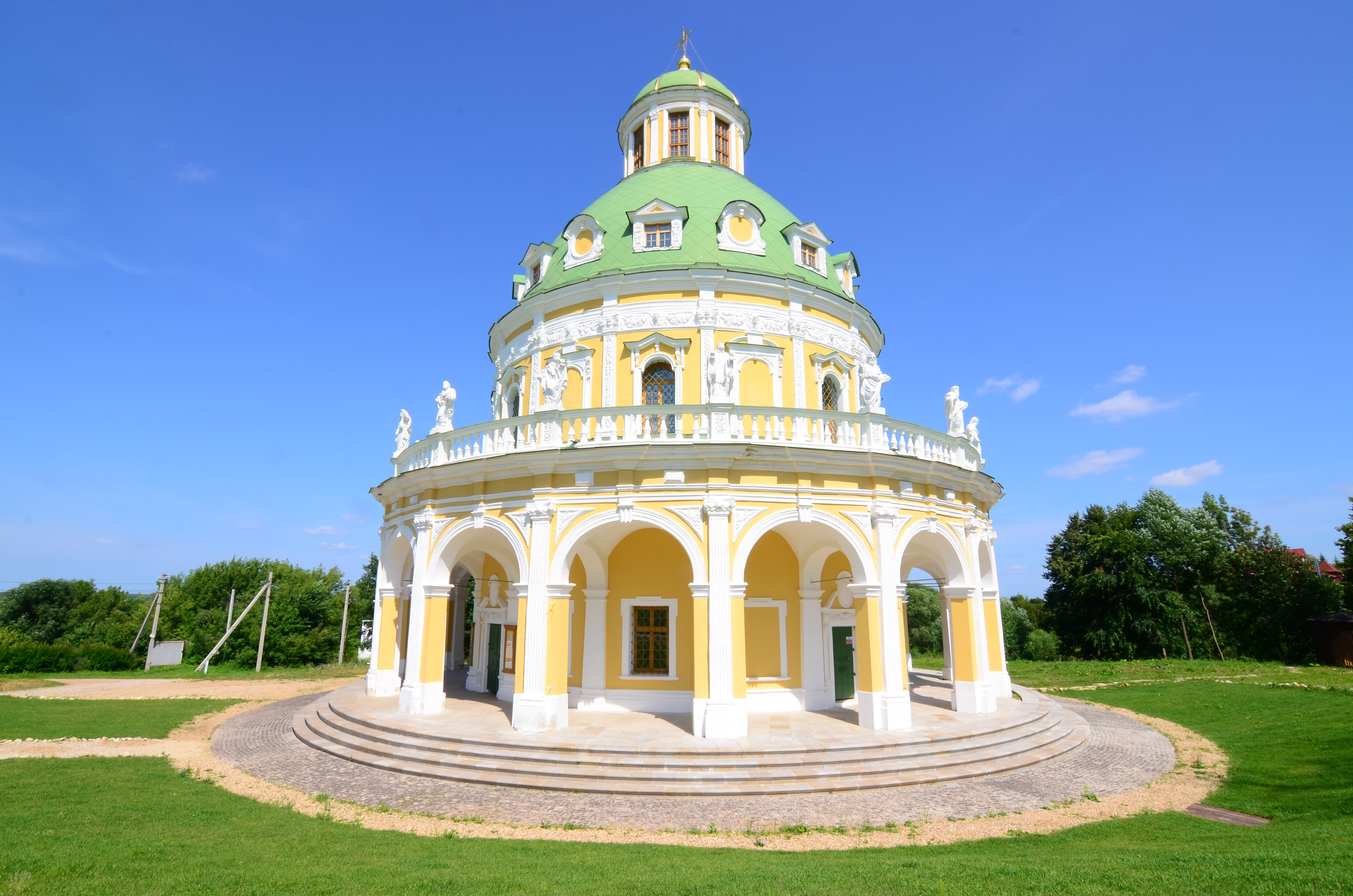 Церковь Рождества Пресвятой Богородицы: Подмоклово, Серпуховский район, Московская область